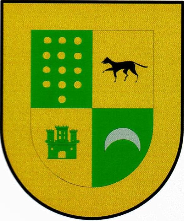 Escudo de la Junta Administrativa de Marquinez